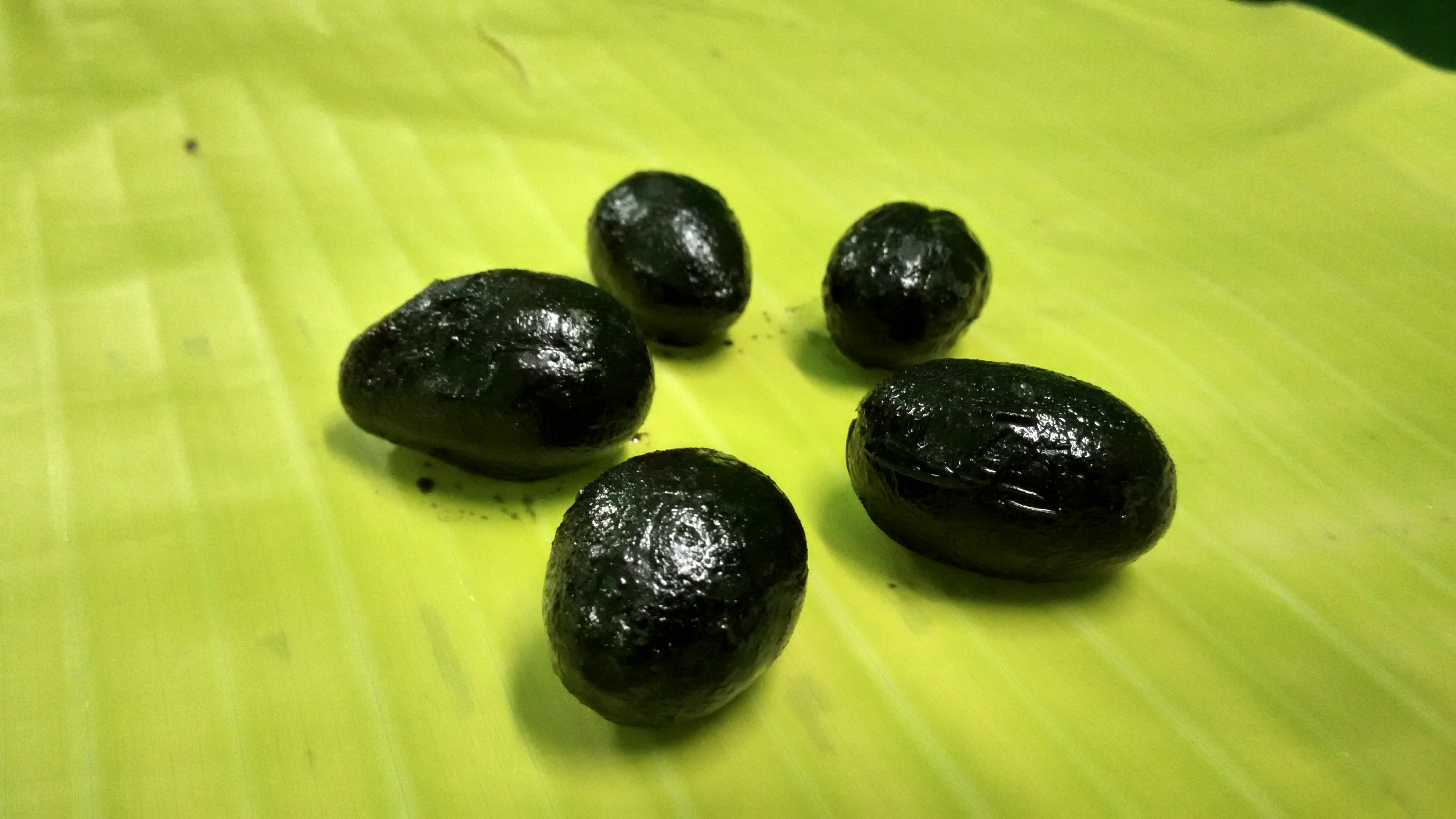 தேன் கடுக்காய்.